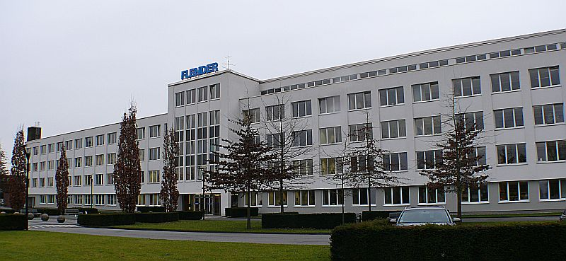 Flender, eigenens Bild